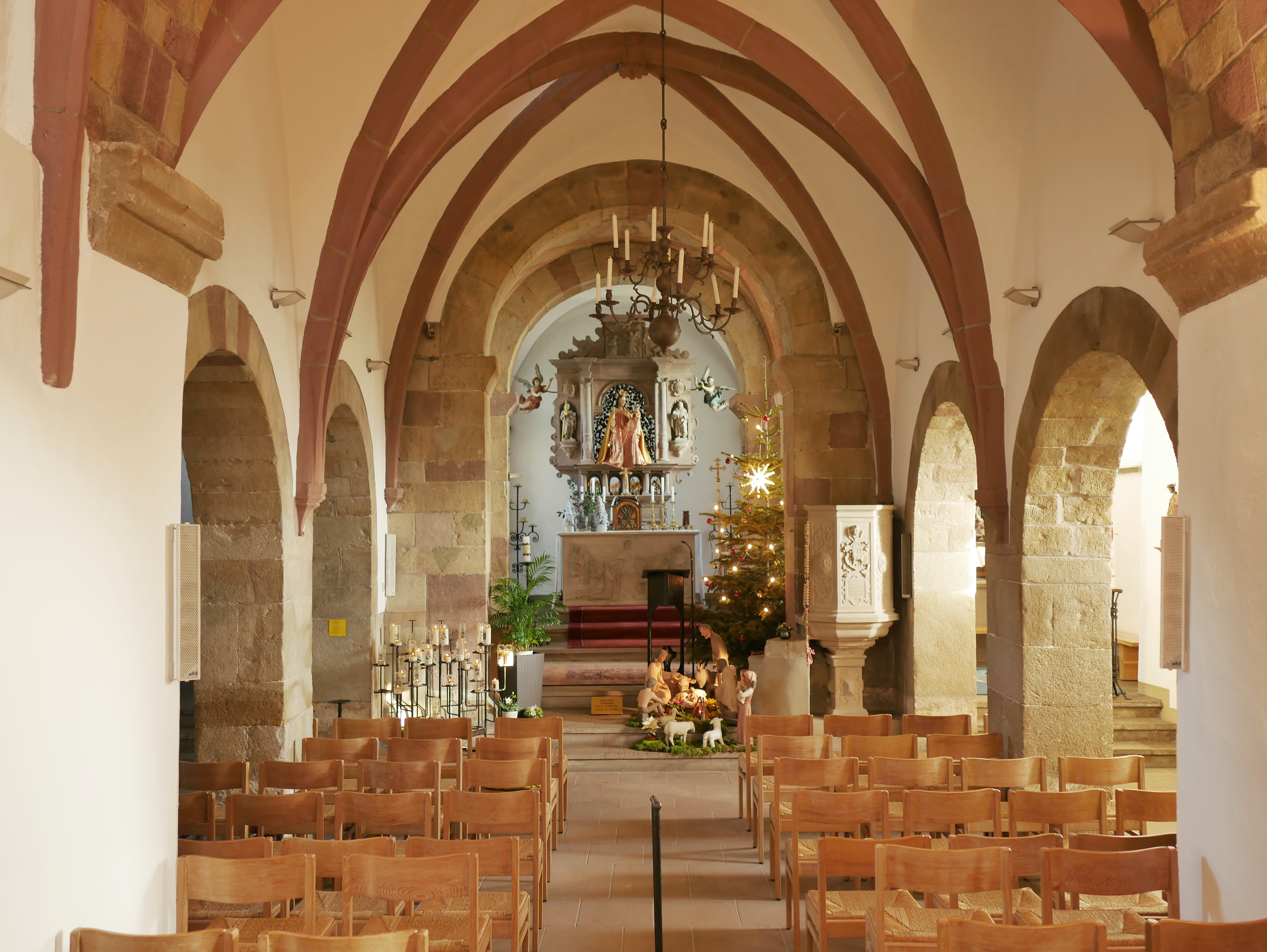 Marienwallfahrtskirche in Girsterklaus bei Rosport (Luxemburg), Mittelschiff